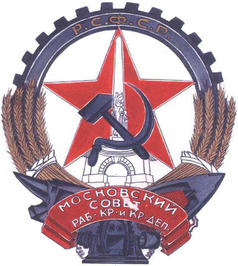 Советский герб Москвы (1924-1993)